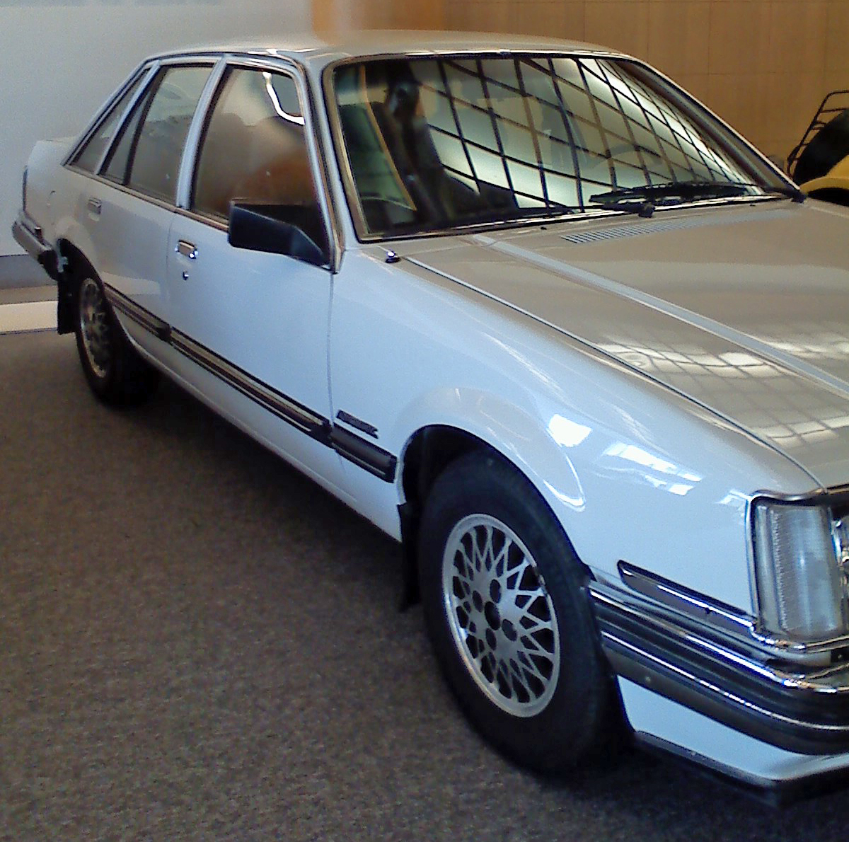 국립민속박물관에서 전시했던 대우 로얄 살롱입니다.